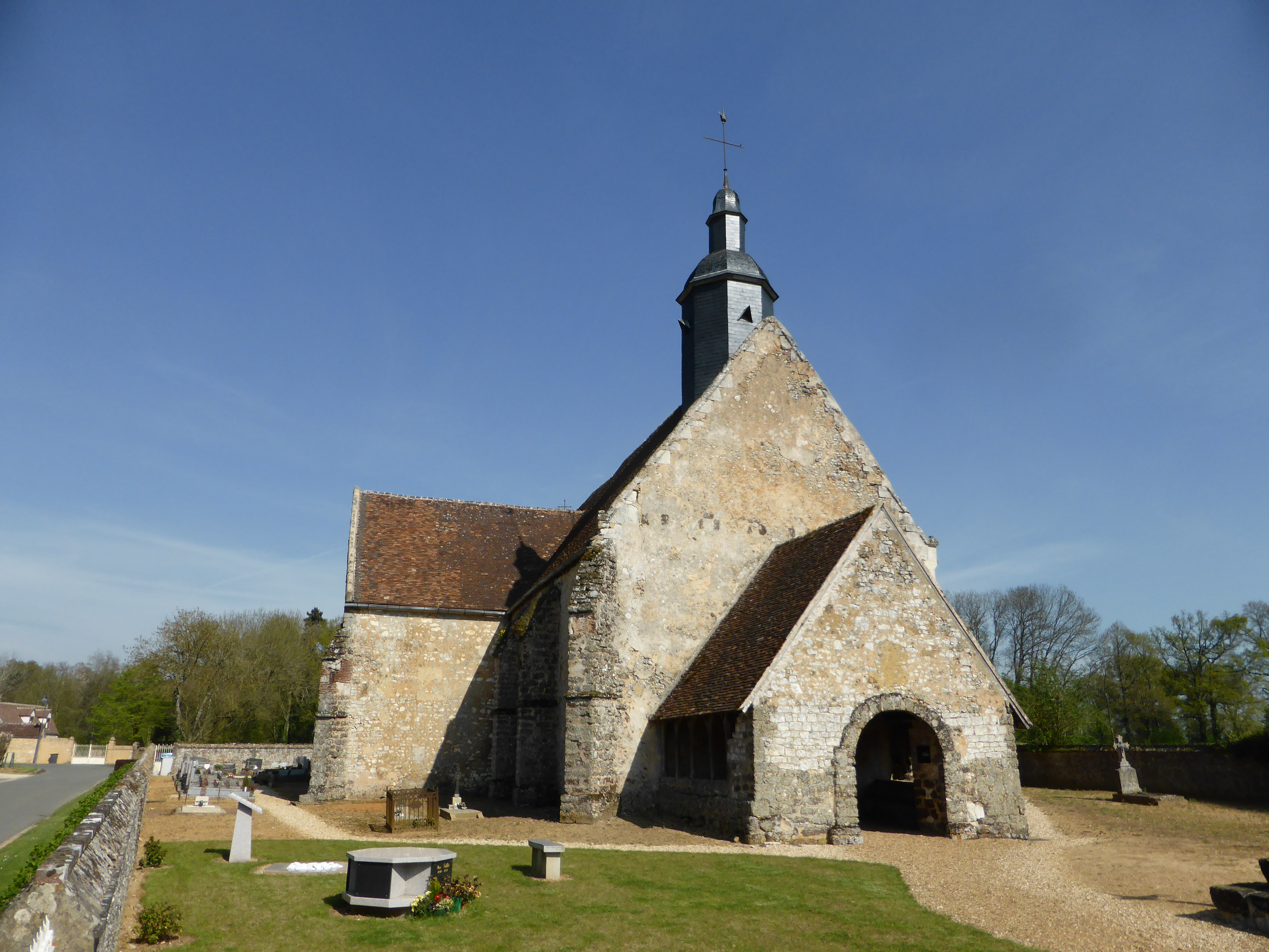 Église Saint-Barthélemy de Montireau, en Eure-et-Loir.